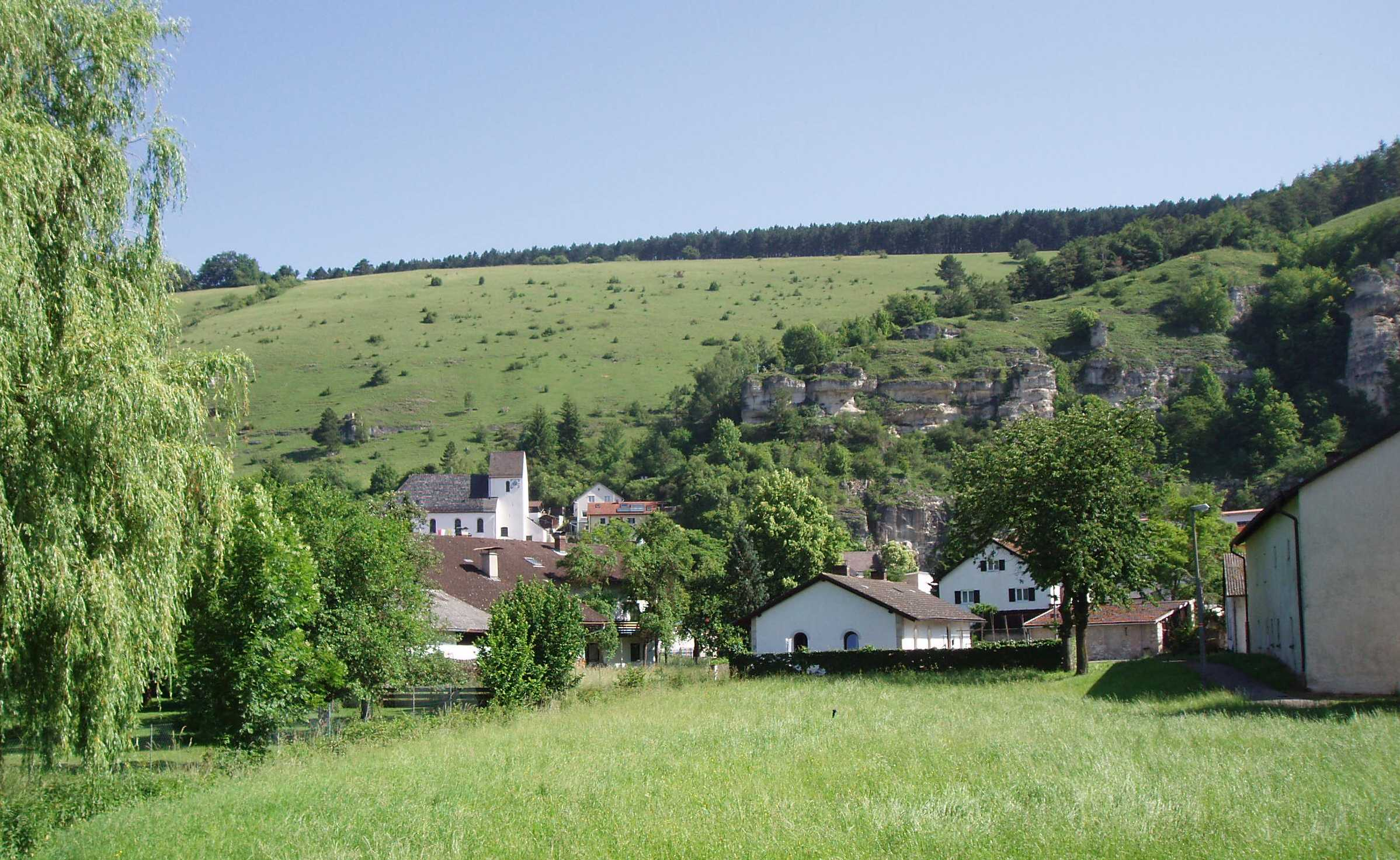 Obereichstätt im Almühltal